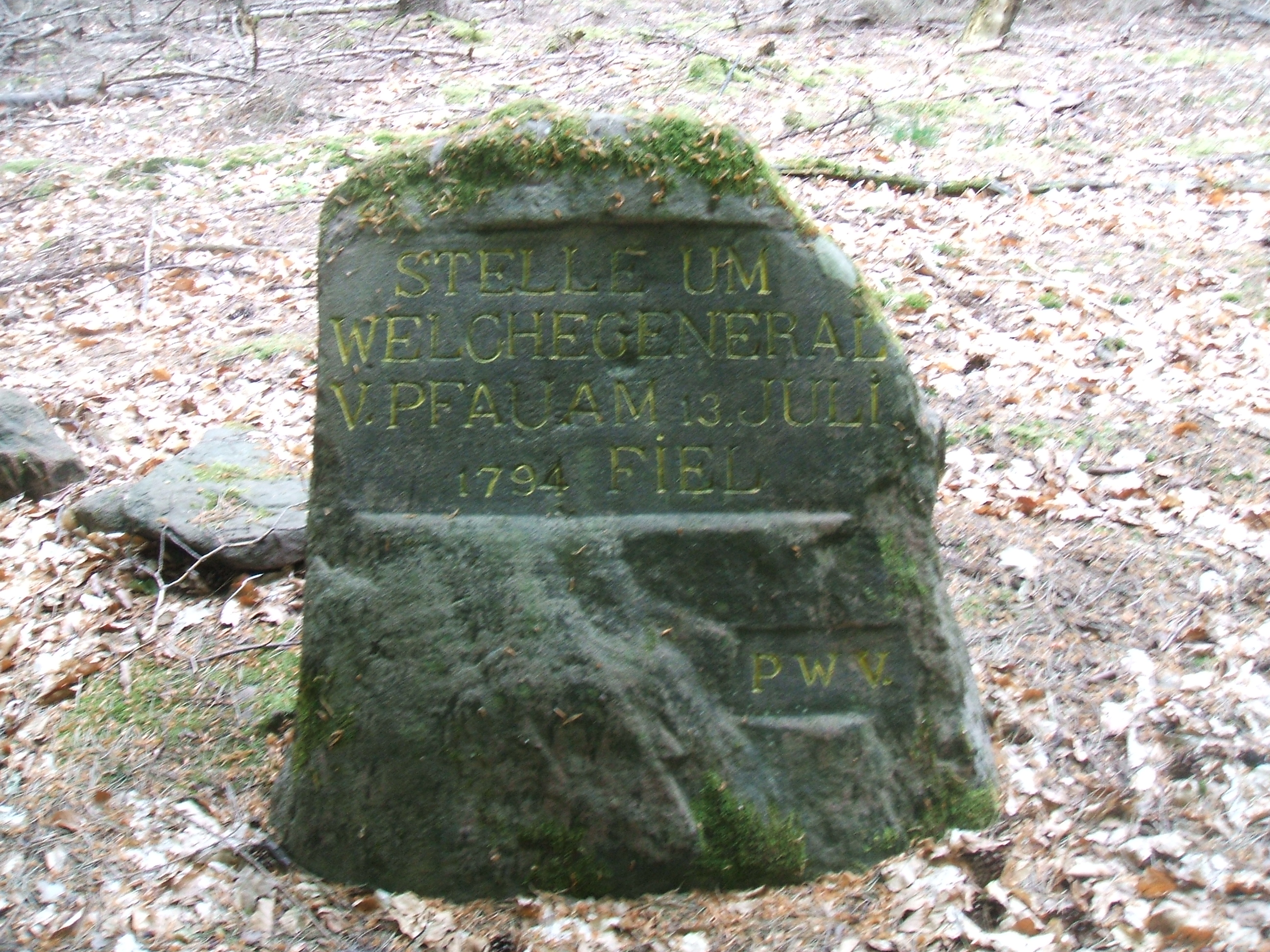 Ritterstein "Stelle um welche General von Pfau am 13. Juli 1794 fiel", "Pfaustein"